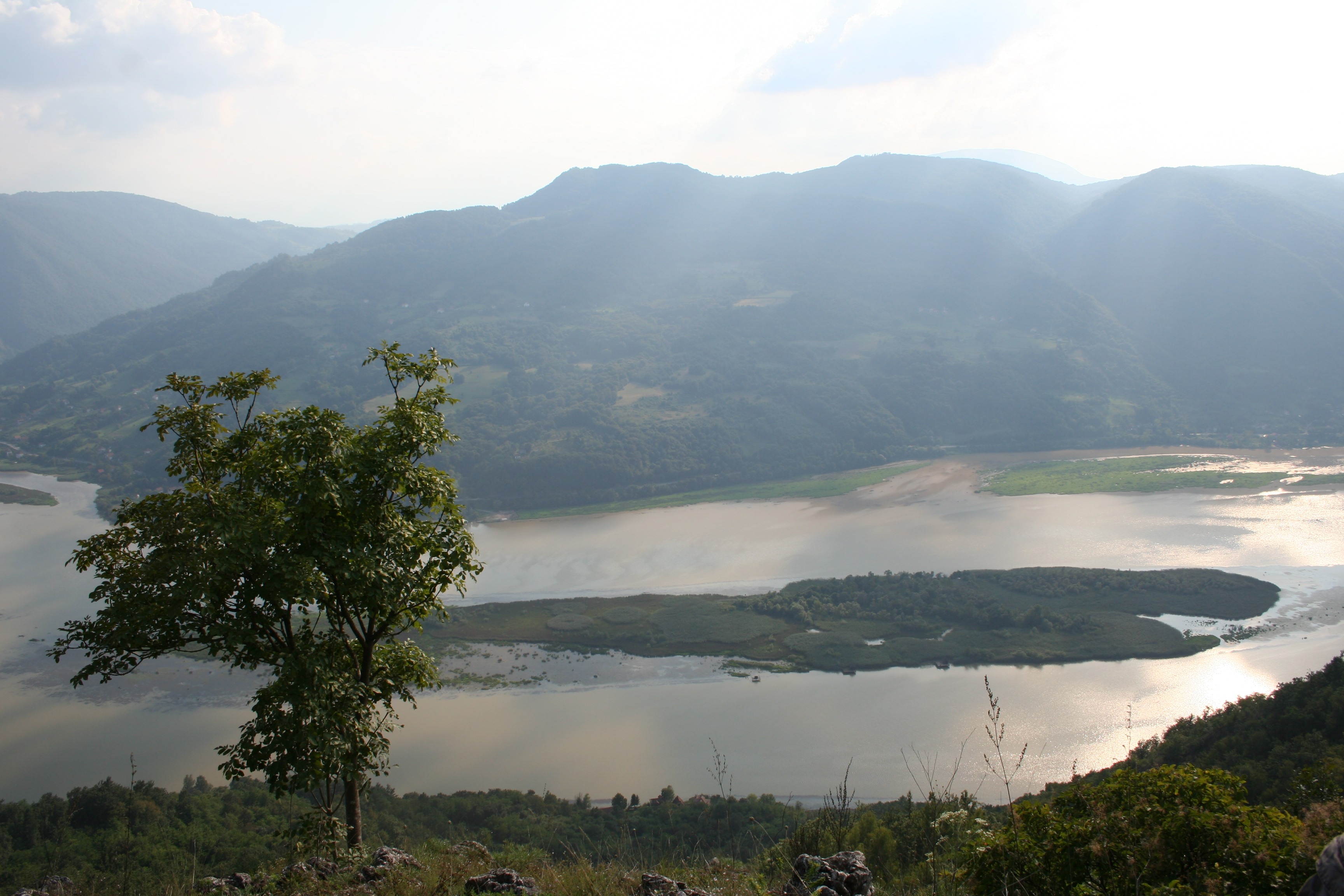 Pogled sa vidikovca Zbir na zvorničko jezero i reku Drinu